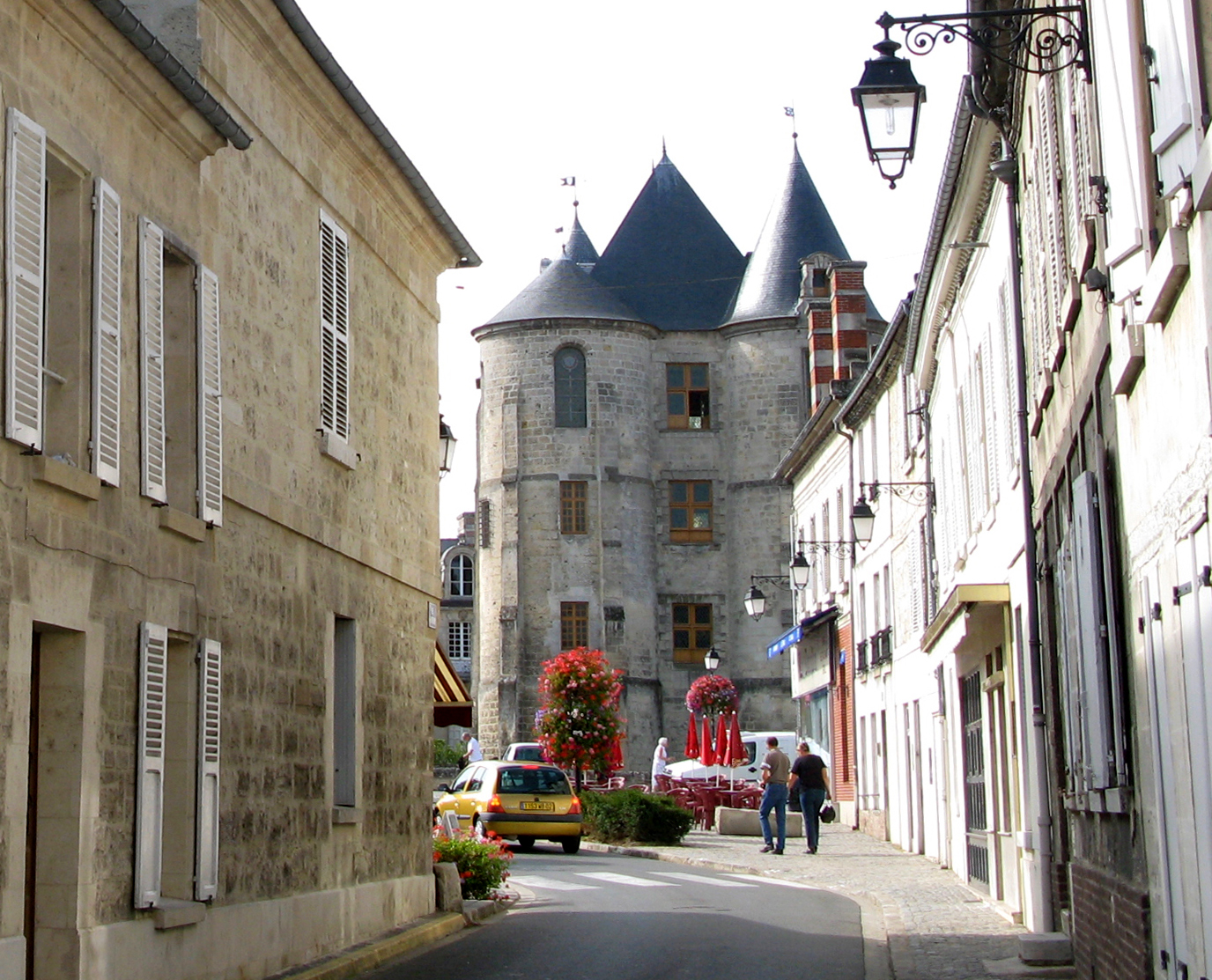 Vic-sur-Aisne (Aisne, France) - La rue de Fontenoy débouchant sur le donjon. . .